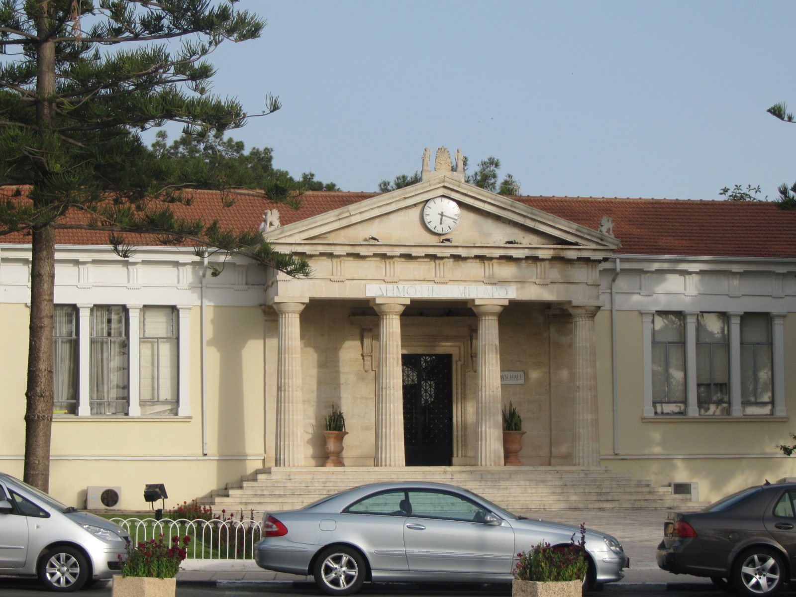 Paphos by Paride